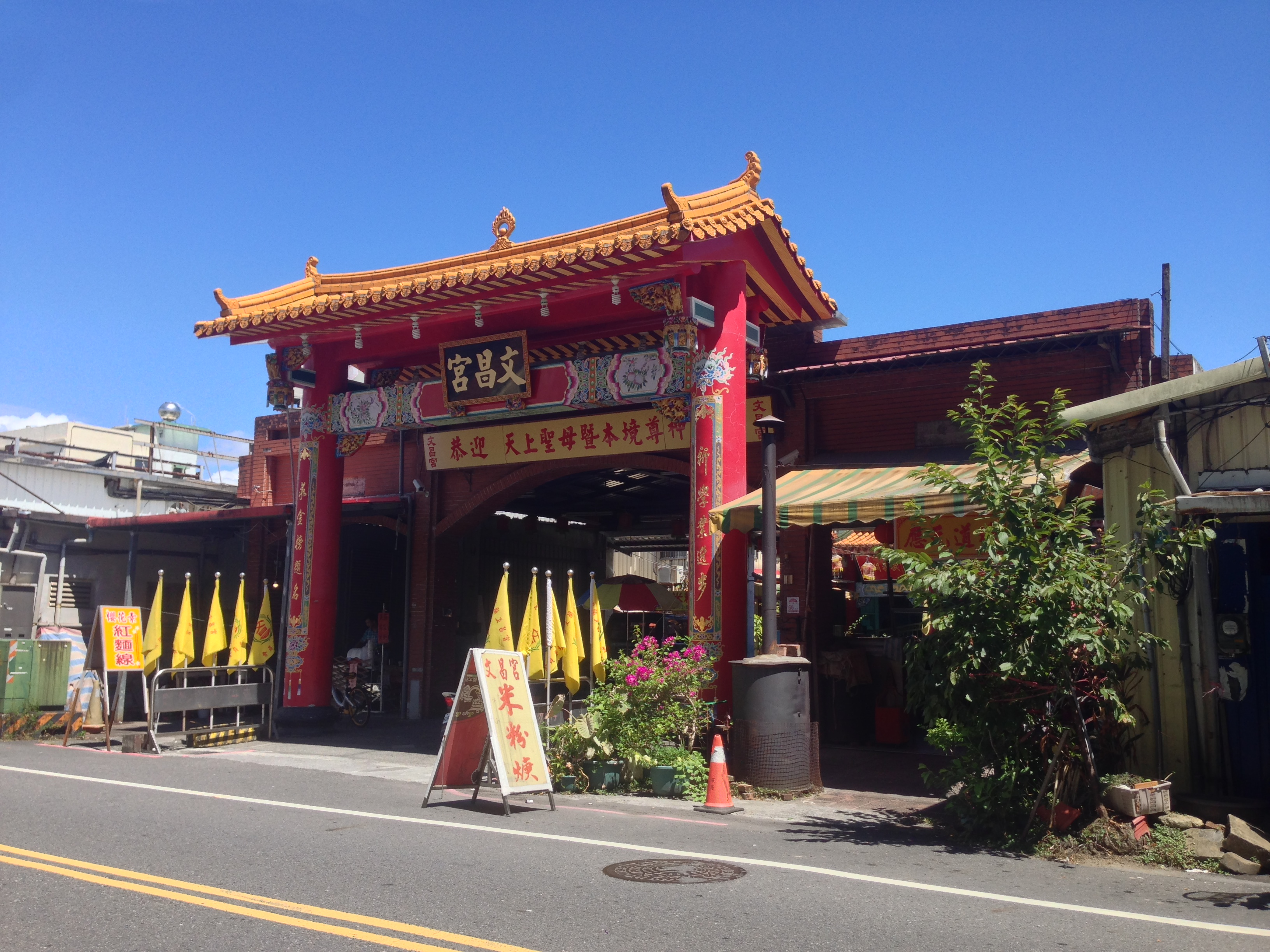 中文（台灣）: 宜蘭文昌廟入口